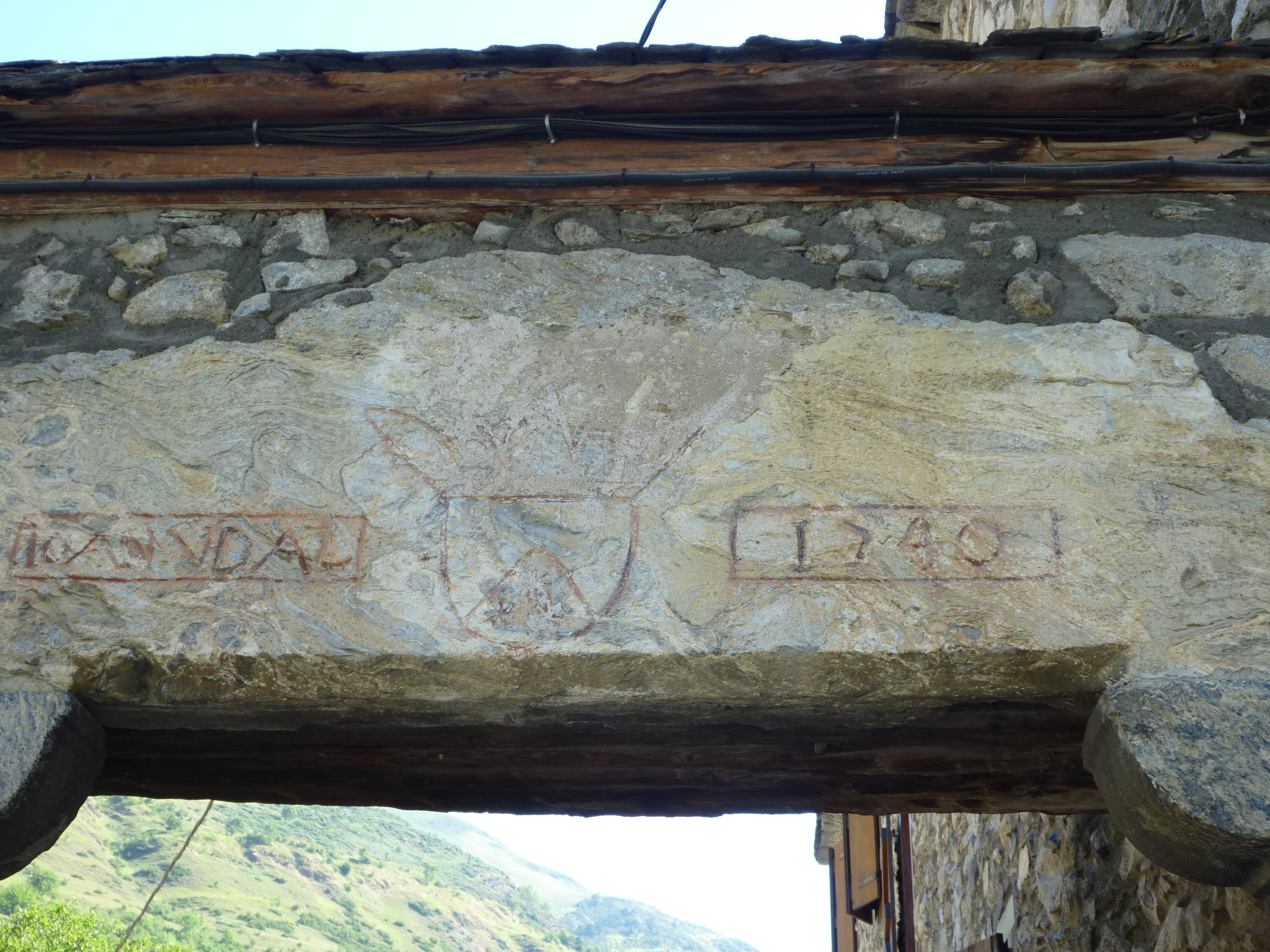 Casa Jaumitxu a Casarilh (Vielha e Mijaran): dintell de la porta de ponent